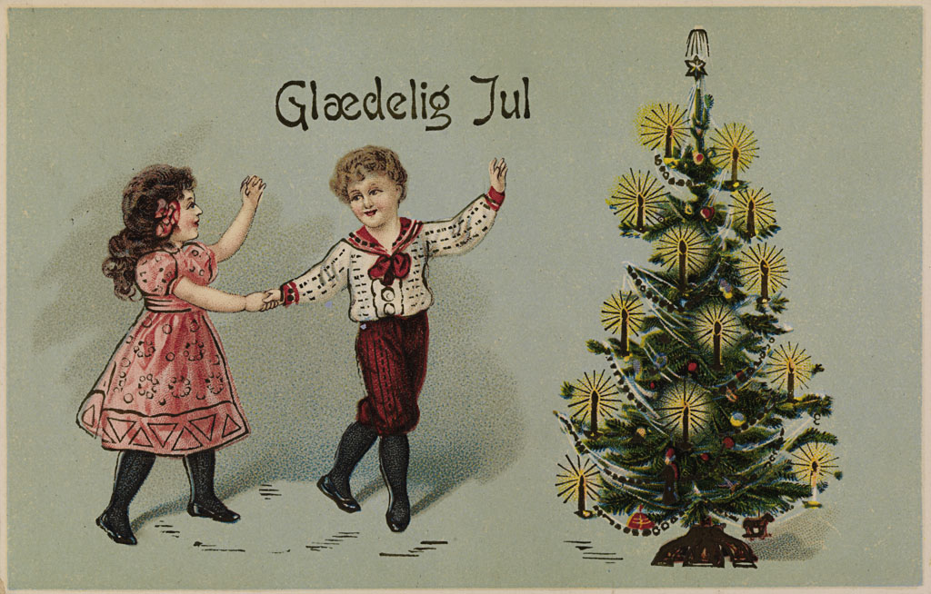 Tittel / Title: Glædelig Jul, ca 1910 Motiv / Motif: Postkort / julekort. Dato / Date: ca 1910 Kunsnter / Artist: ukjent / unknown Utgiver / Publisher: G. G. K. No. 354 (trykket i Tyskland) Eier / Owner Institution: Nasjonalbiblioteket / National Library of Norway Lenke / Link: Bildesignatur / Image Number: blds_03016